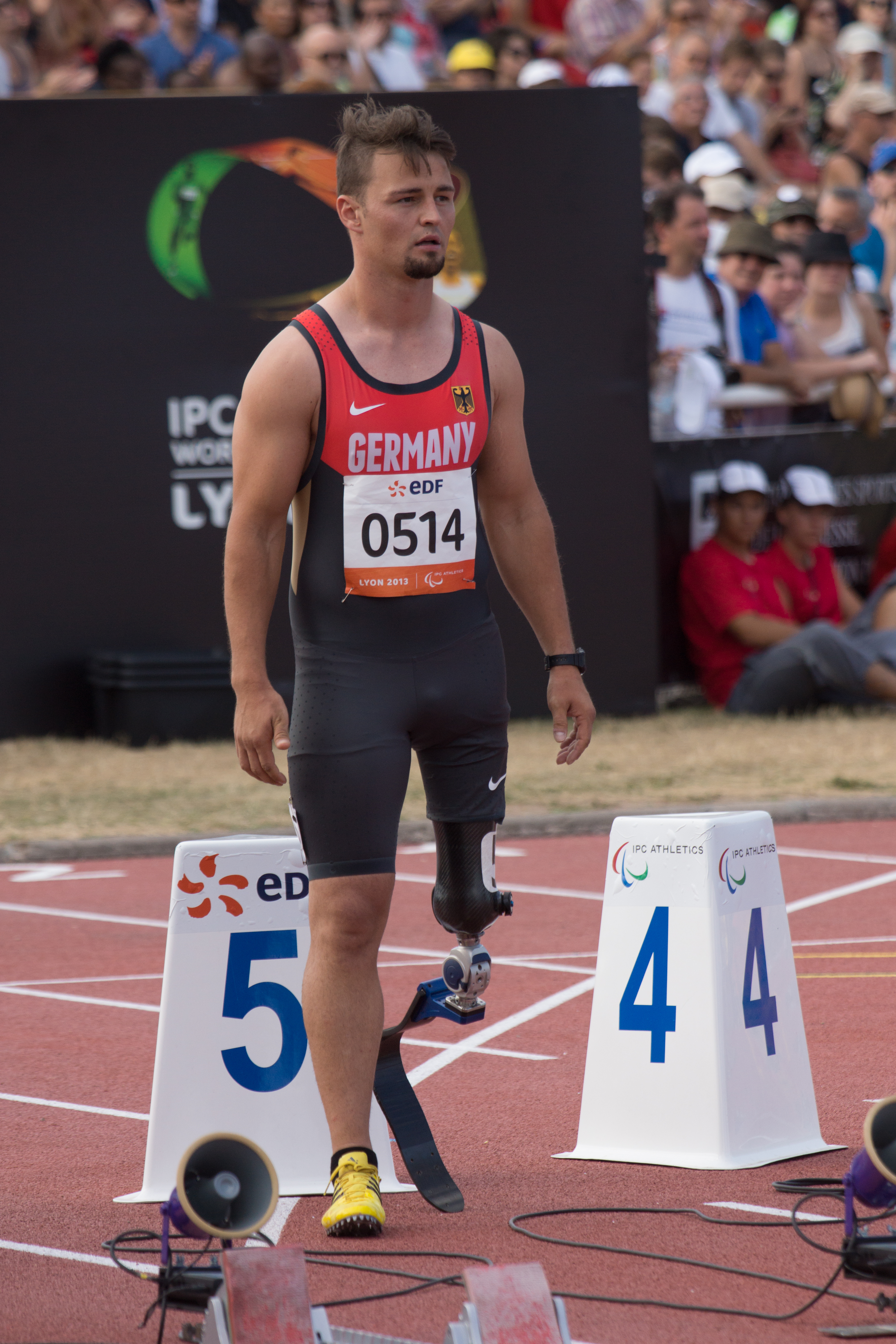 Championnats du monde d'athlétisme handisport 2013. 100 mètres masculin T42.